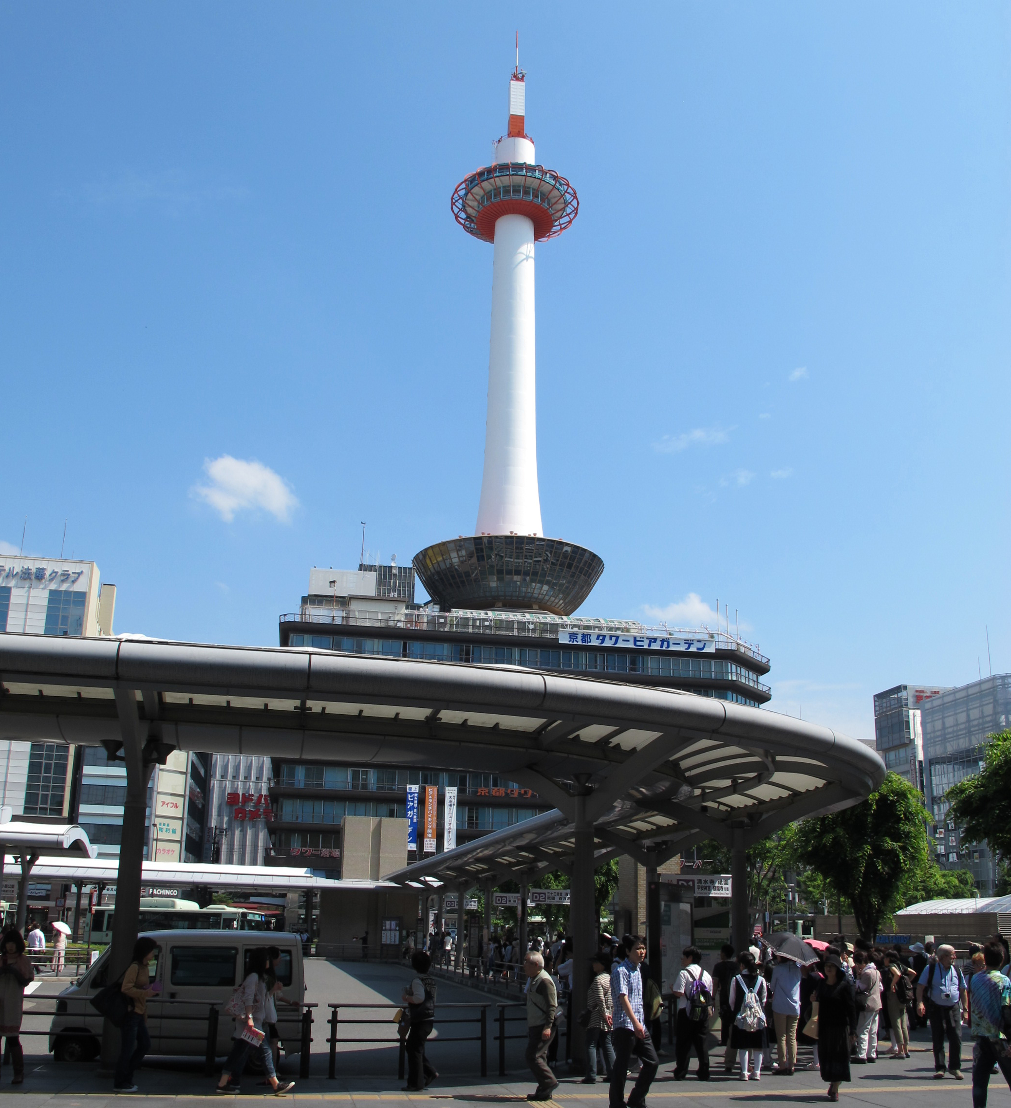 Kyoto tower